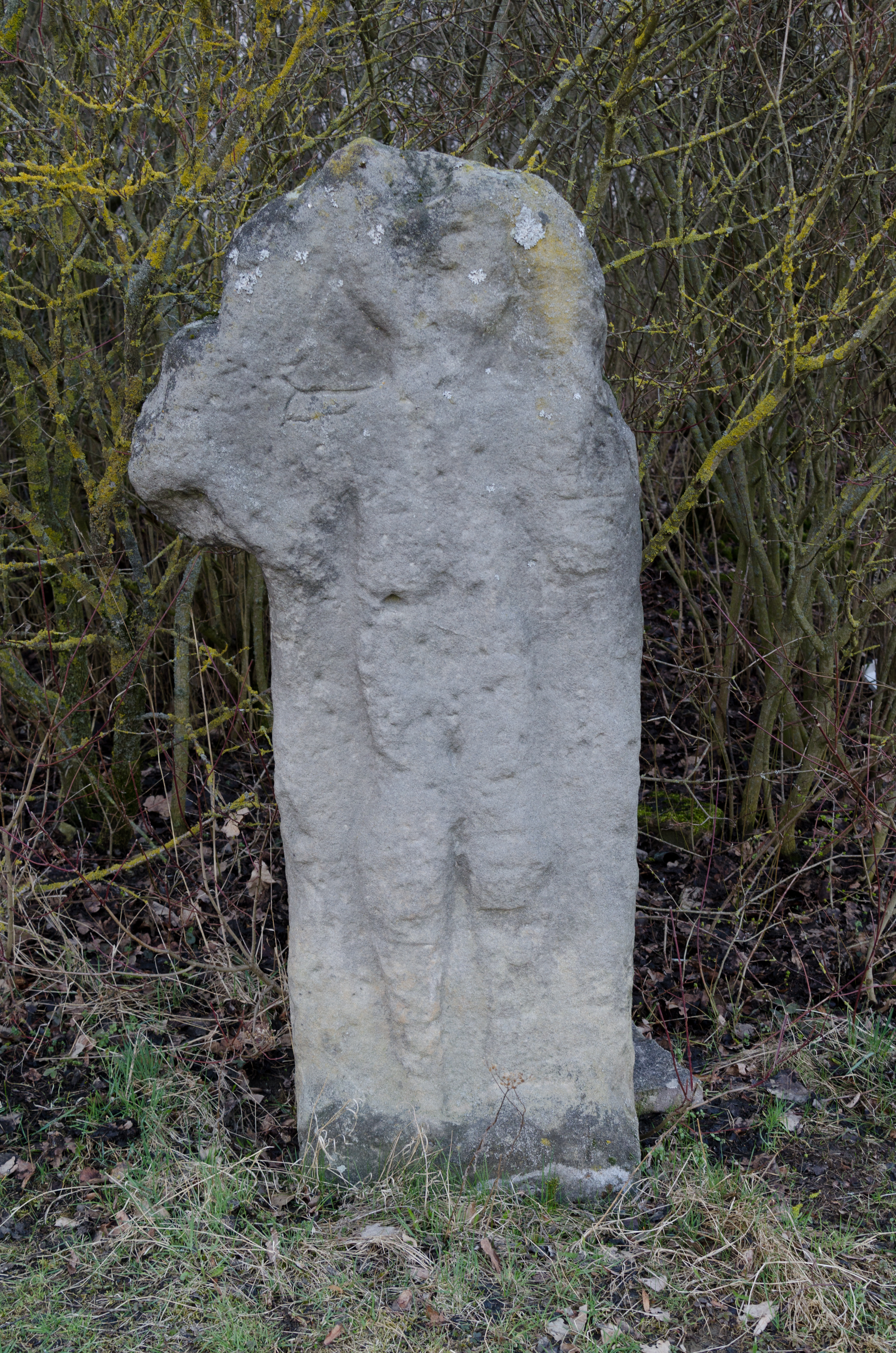 Bindlach, Benk, Ritterstein